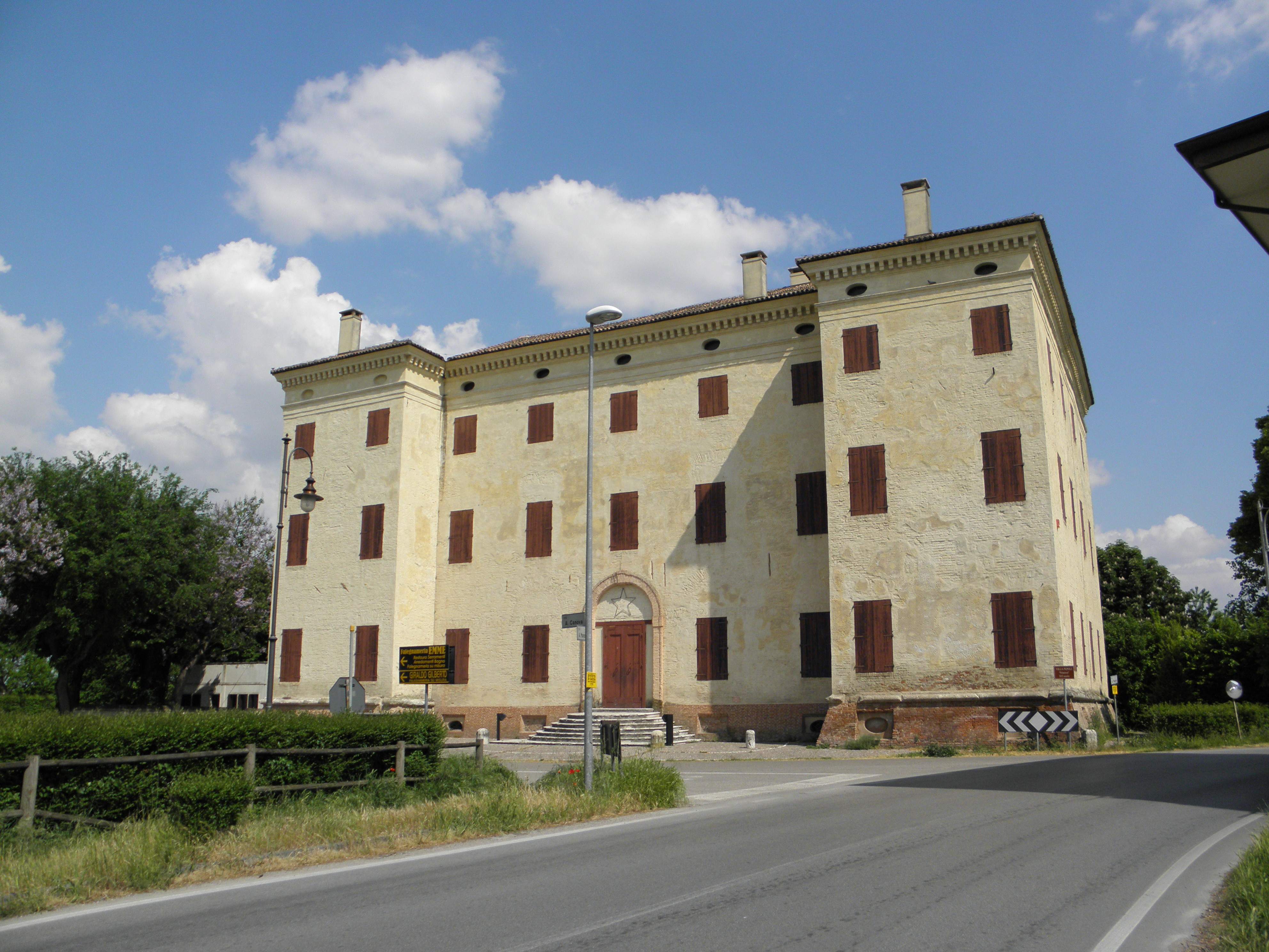 Trecenta: Palazzo Pepoli, detto "il Palazzon".